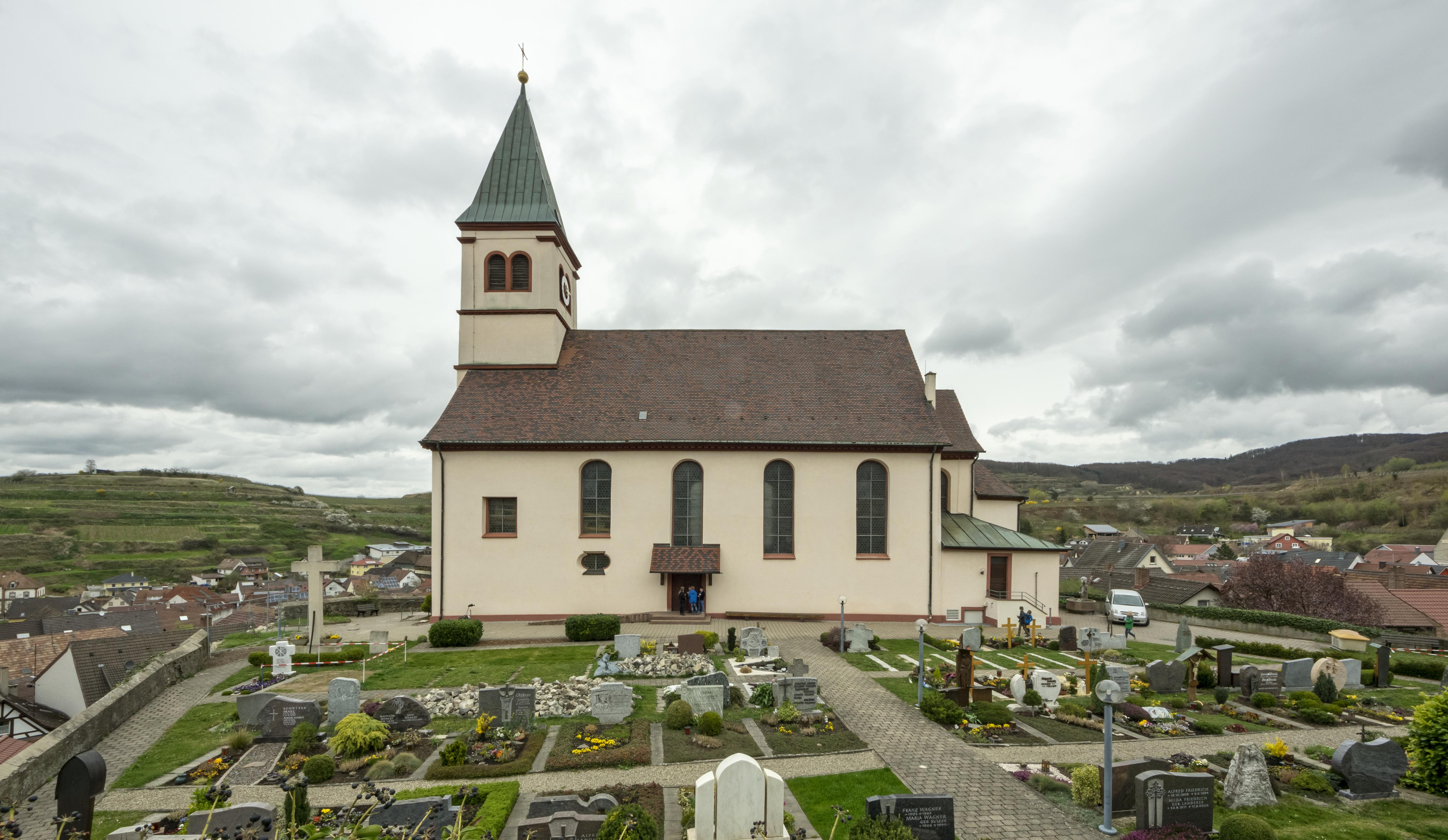 Bilder aus Kiechlinsbergen Die Kirche vom Friedhof aus